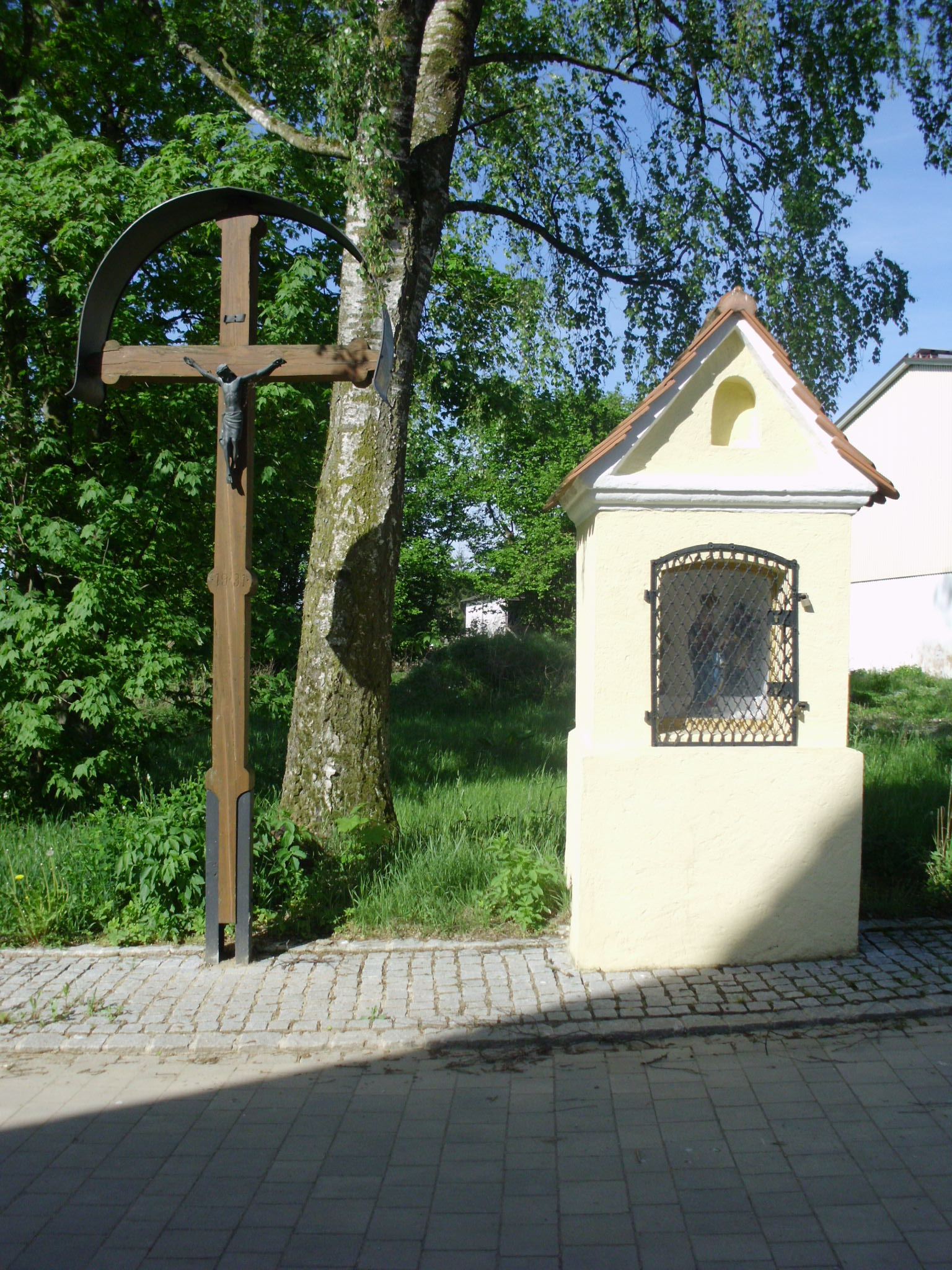 Steinacker, Ortsteil von Gunzenhausen im mittelfränkischen Landkreis Weißenburg-Gunzenhausen, Hofkapelle und Kreuz